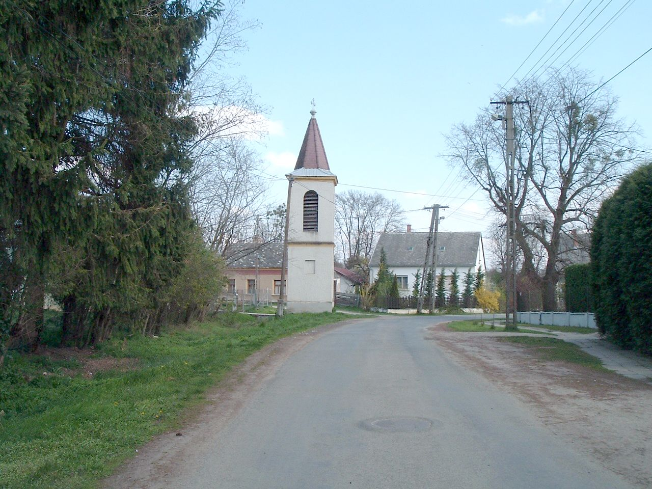 Zarkaháza, Szombathely